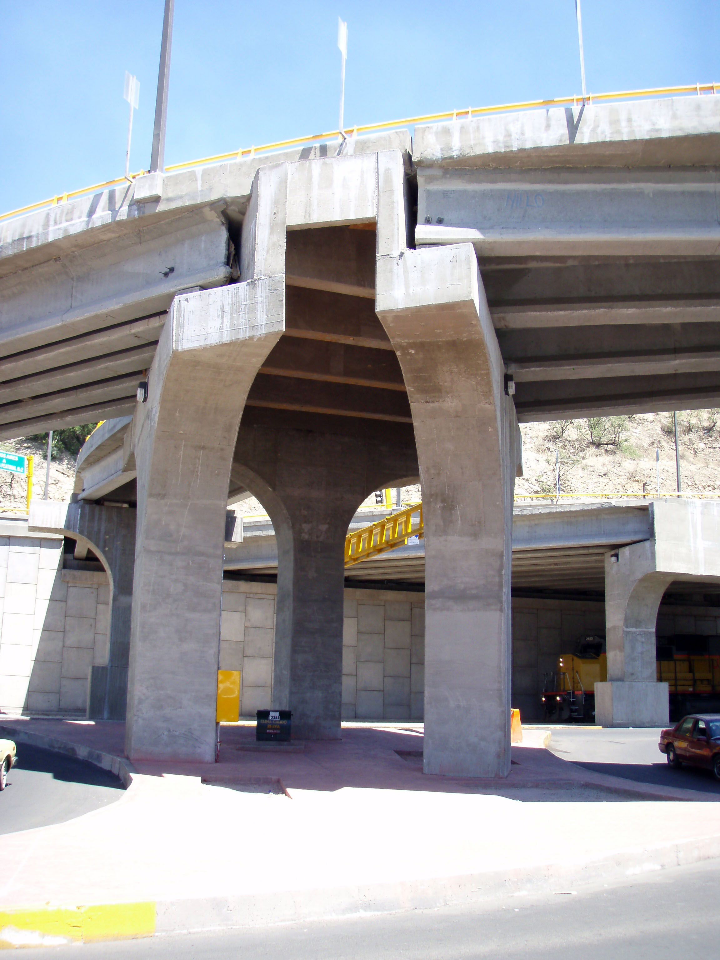 Distribuidor vial Buenos Aires, en Nogales.